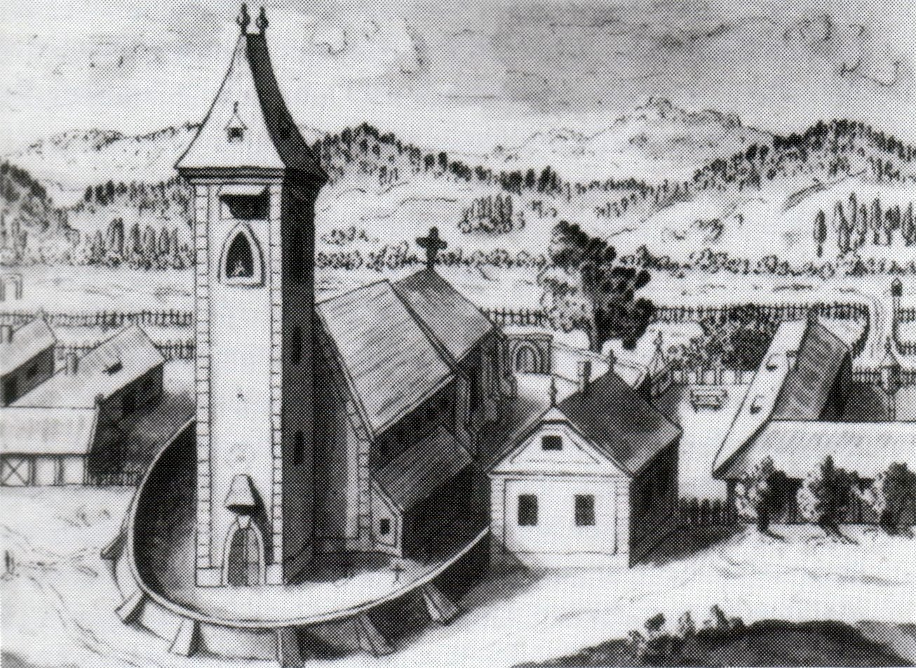 Kirche St.Georgen 1758, Aquilin Hacker